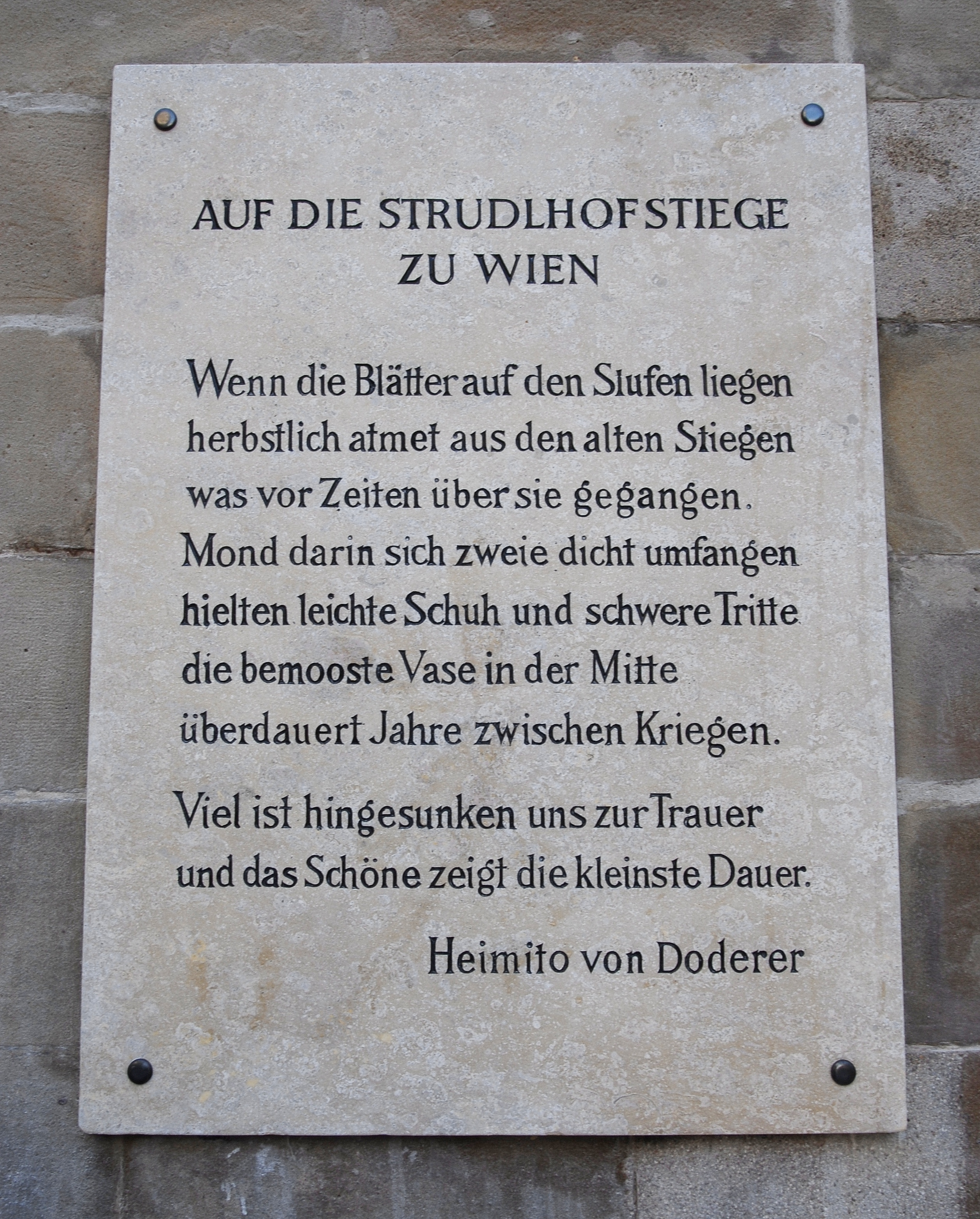 Tafel mit Gedicht von Heimito von Doderer, Strudlhofstiege in Wien